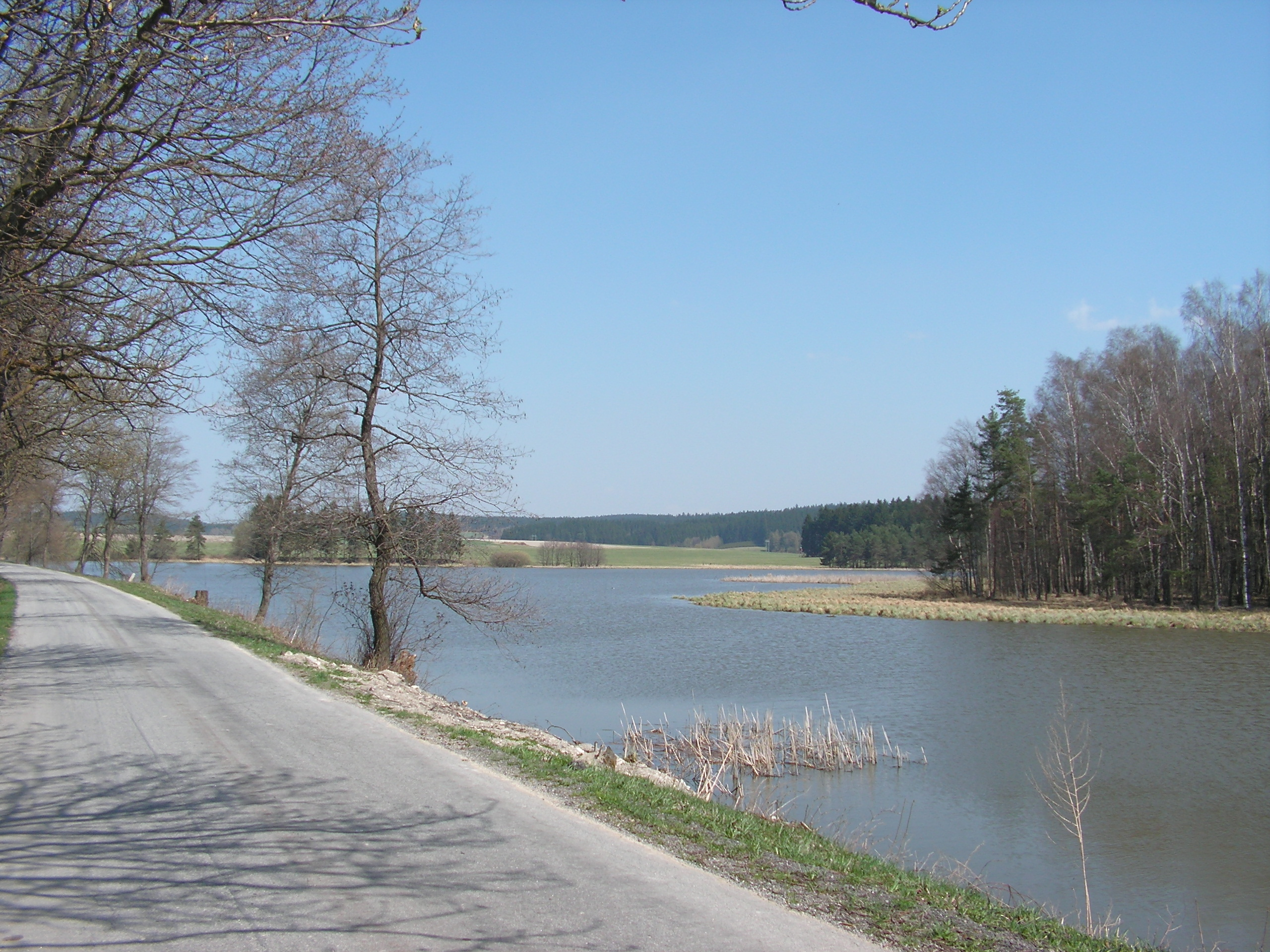 Rybník Malé Dářko v okrese Žďár nad Sázavou